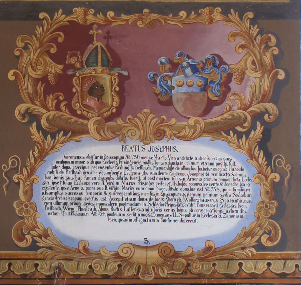 Wappentafel von Joseph von Verona, Bischof von Freising, im Fürstengang zwischen Fürstbischöflicher Residenz und Freisinger Dom. Links das geistliche, rechts das persönliche Wappen, darunter ein lateinischer Text mit kurzer Biographie.